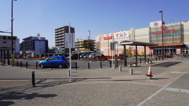 甚目寺駅北口のロータリー